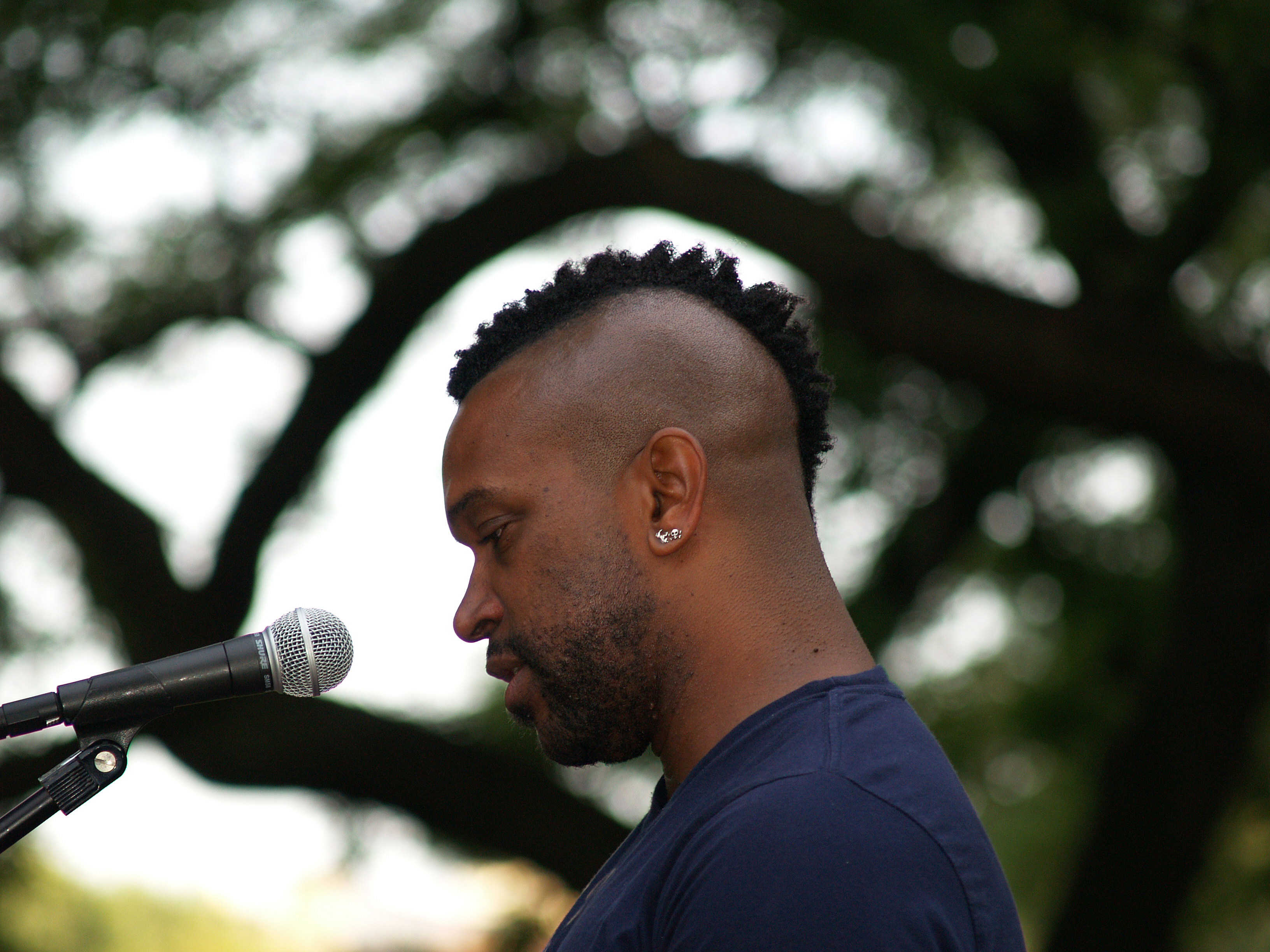 Roger Bonair-Agard